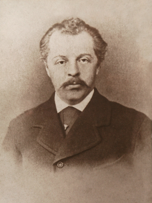 фотография Д.П. Соломирского